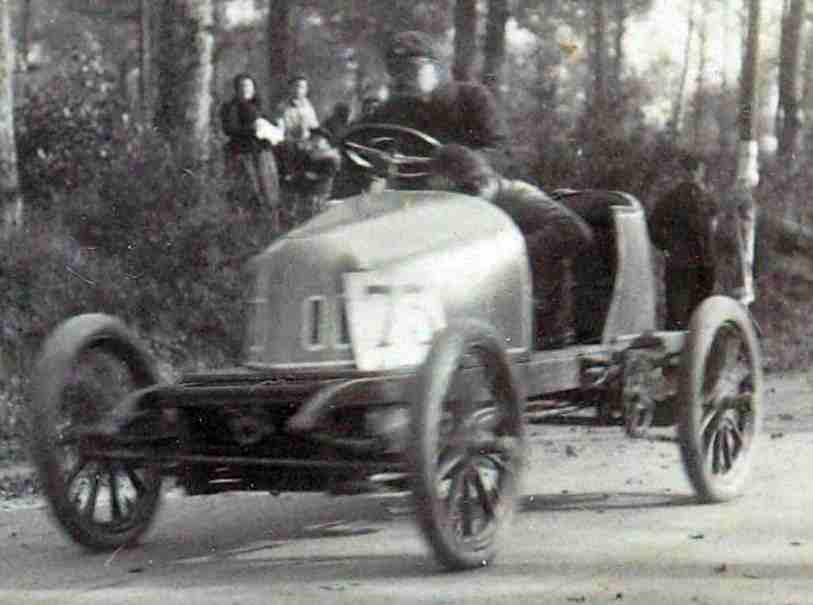 [Collection Jules Beau. Photographie sportive] : T. 24. Années 1903 et 1904 / Jules Beau : F. 6v. [Kilomètre, Dourdan, organisé par Le Monde Sportif, 5 novembre 1903]